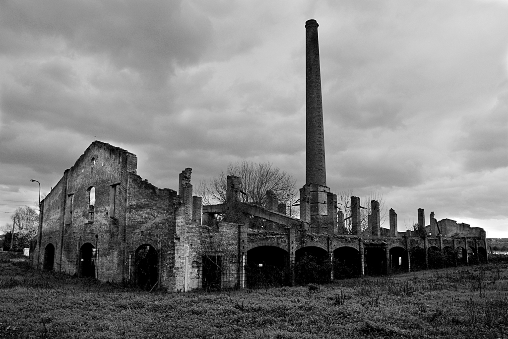 Ruderi della Fornace Braccini situata a Pietroconti, fra la periferia di Pontedera e La Rotta.